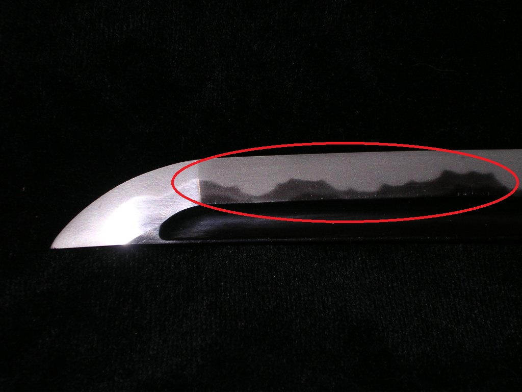 Линия хамона выделена красным кругом.